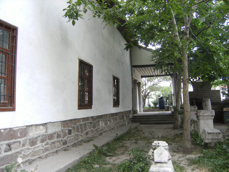 Sultan Alaeddin Cami, Ankara , Türkiye